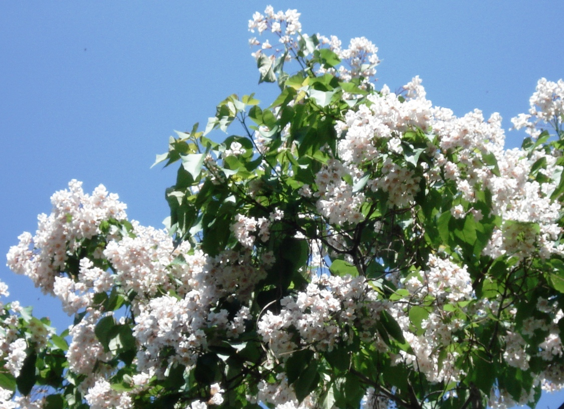 Catalpa fargesii- Blüten und Blätter